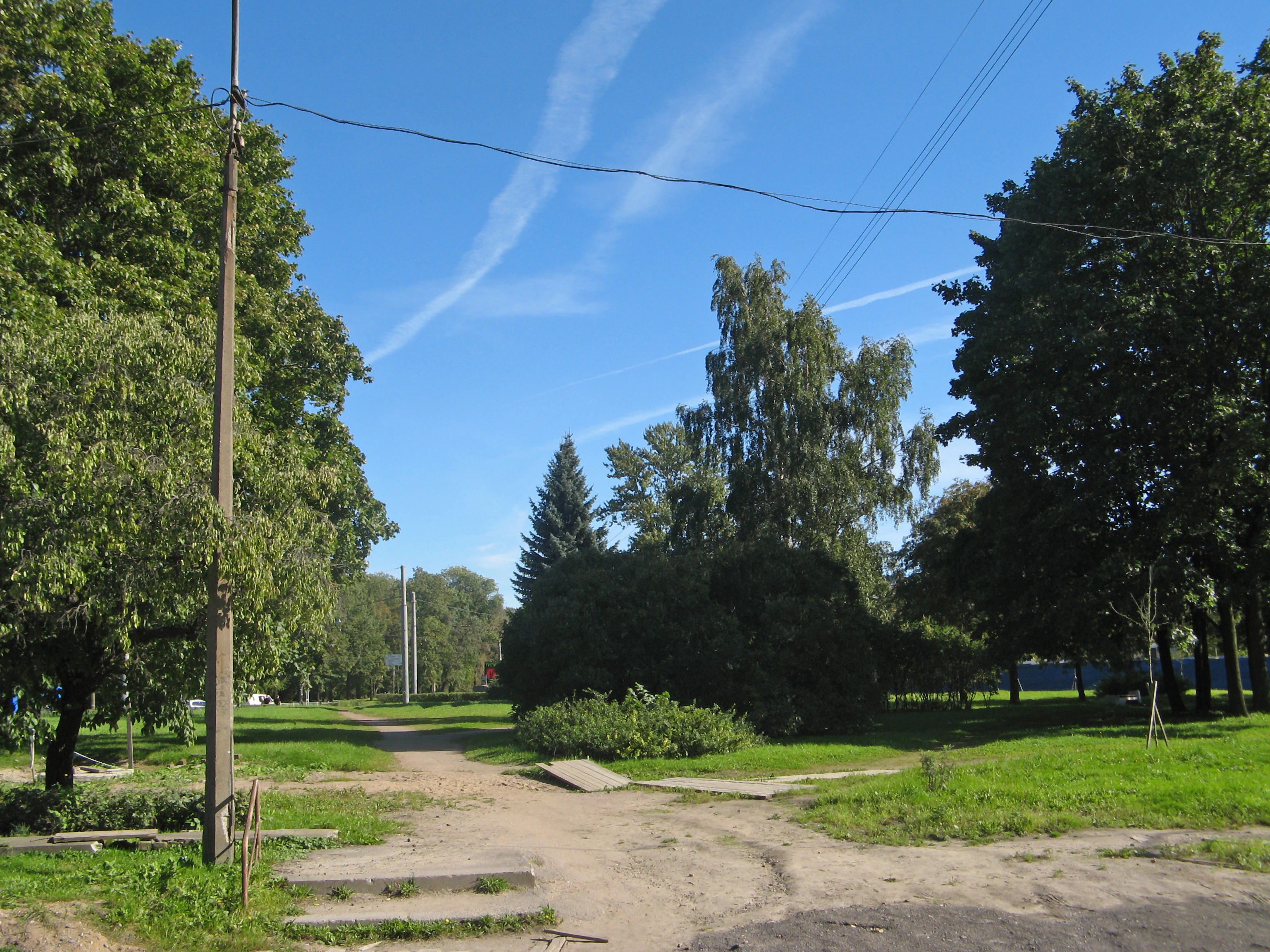 Дёминский сад в Санкт-Петербурге